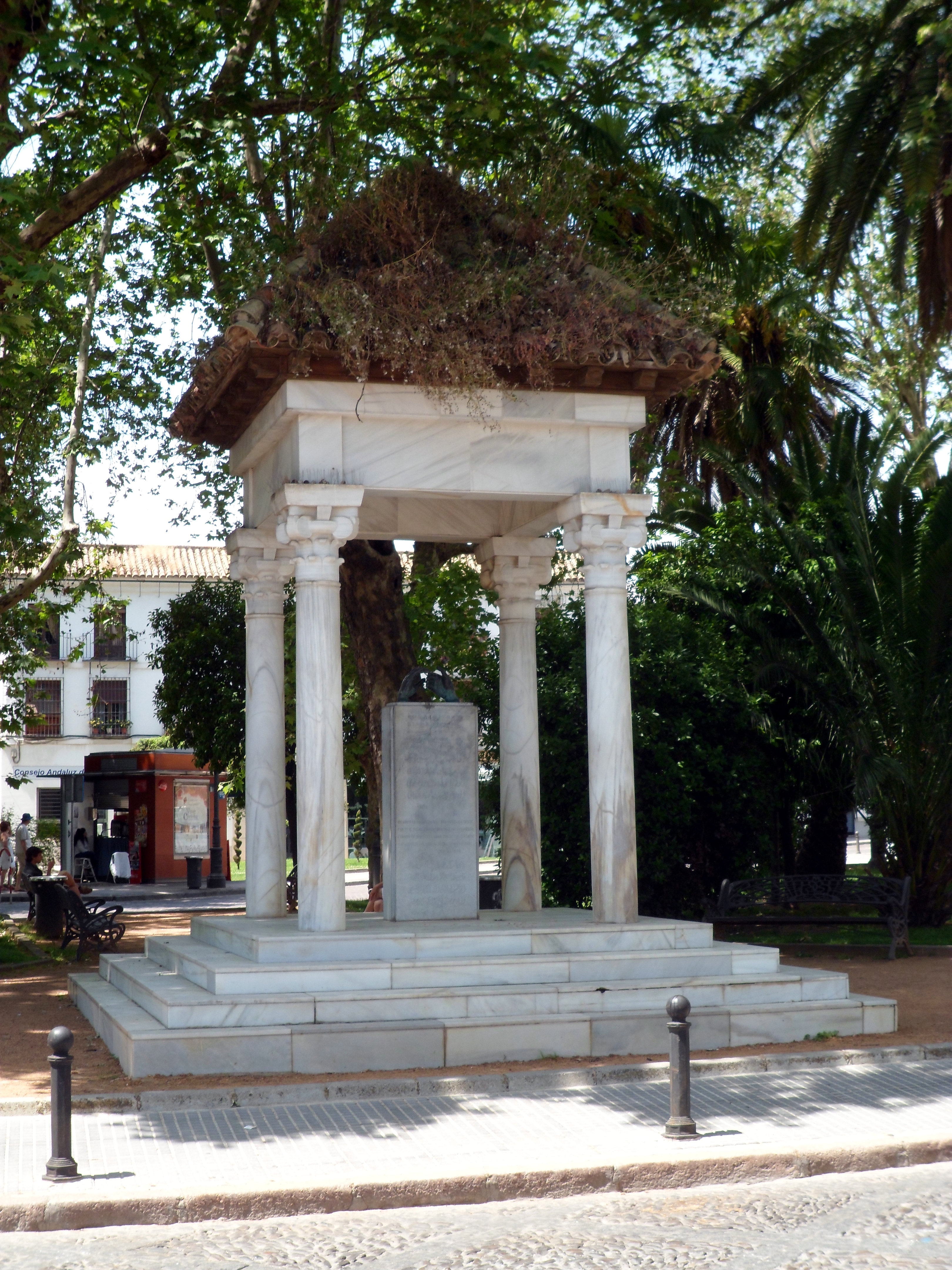 Monumento a los enamorados, Córdoba (España). Dedicado al poeta Ibn Zaydun y a la princesa Wallada.